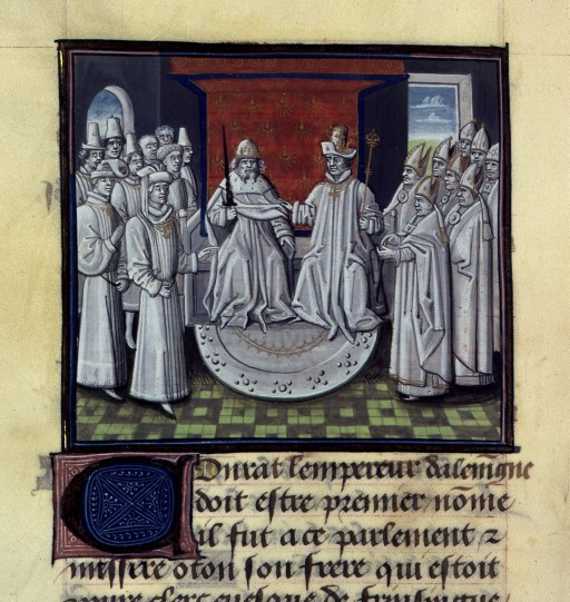 Assemblée d'Acre (1148)